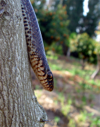 Полоз